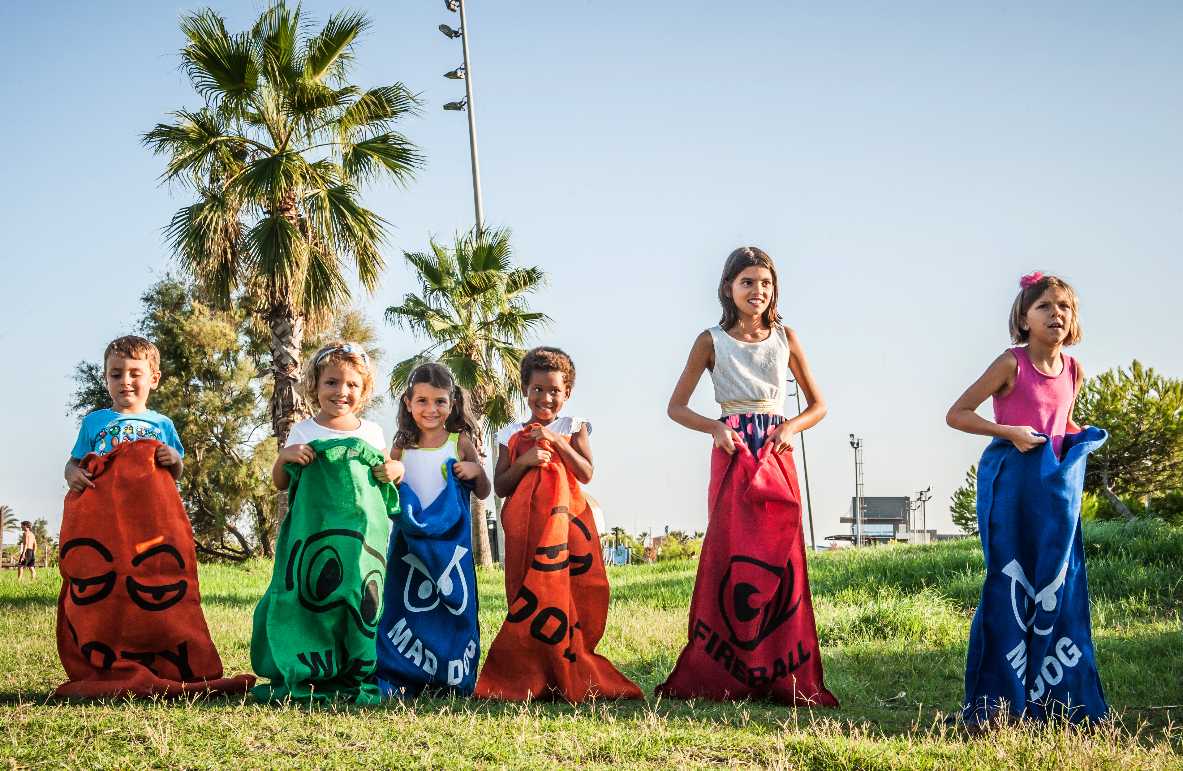 Las carreras de sacos son juegos tradicionales típicos en España